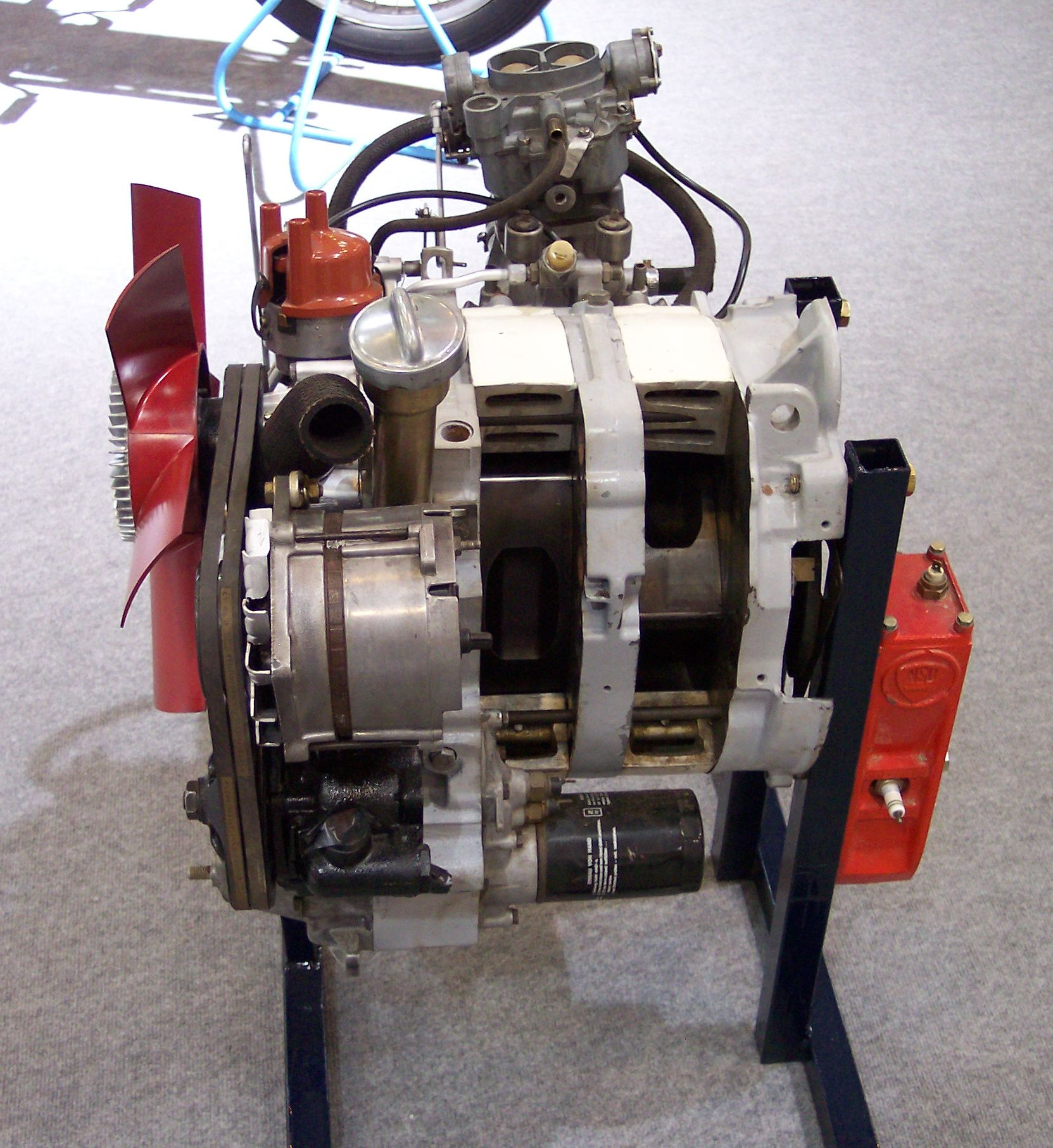 NSU Ro 80 engine